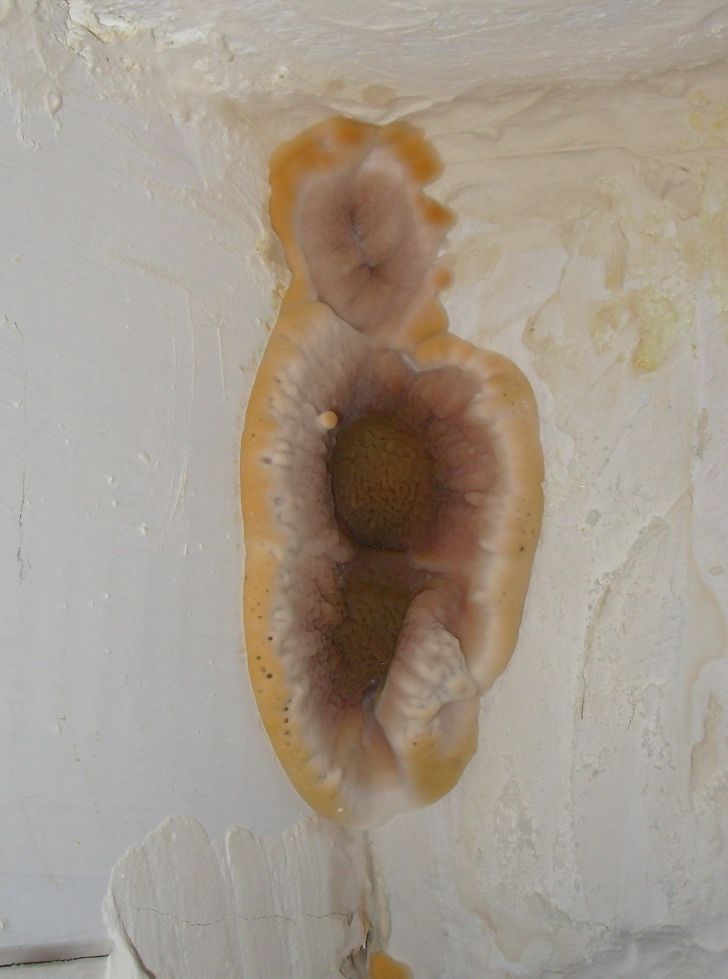 Mérule